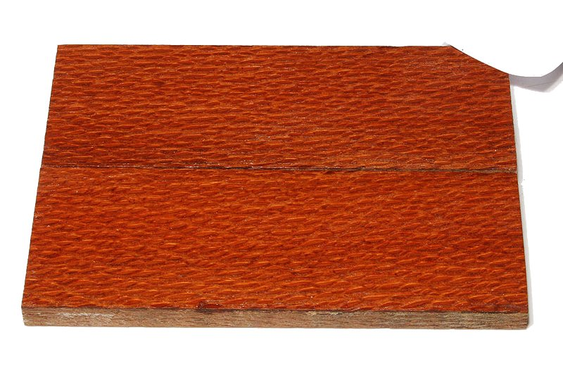 Messergriffschalenpaar aus Perlholz (Roupala Cordifolia)